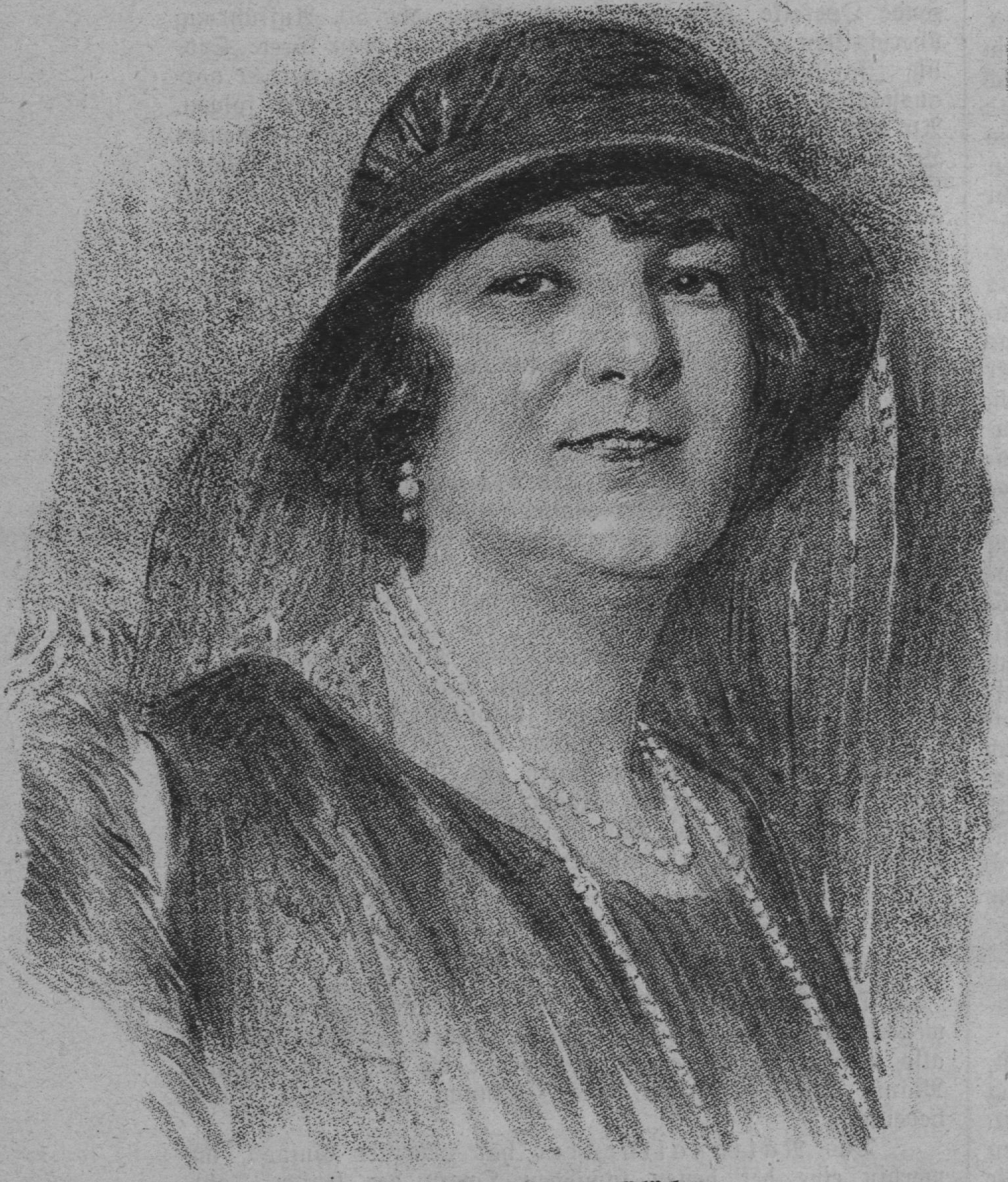 Josefine Kramer-GlöcknerJosefine Kramer-Glöckner (1874–1954), Austrian vocalist and actress